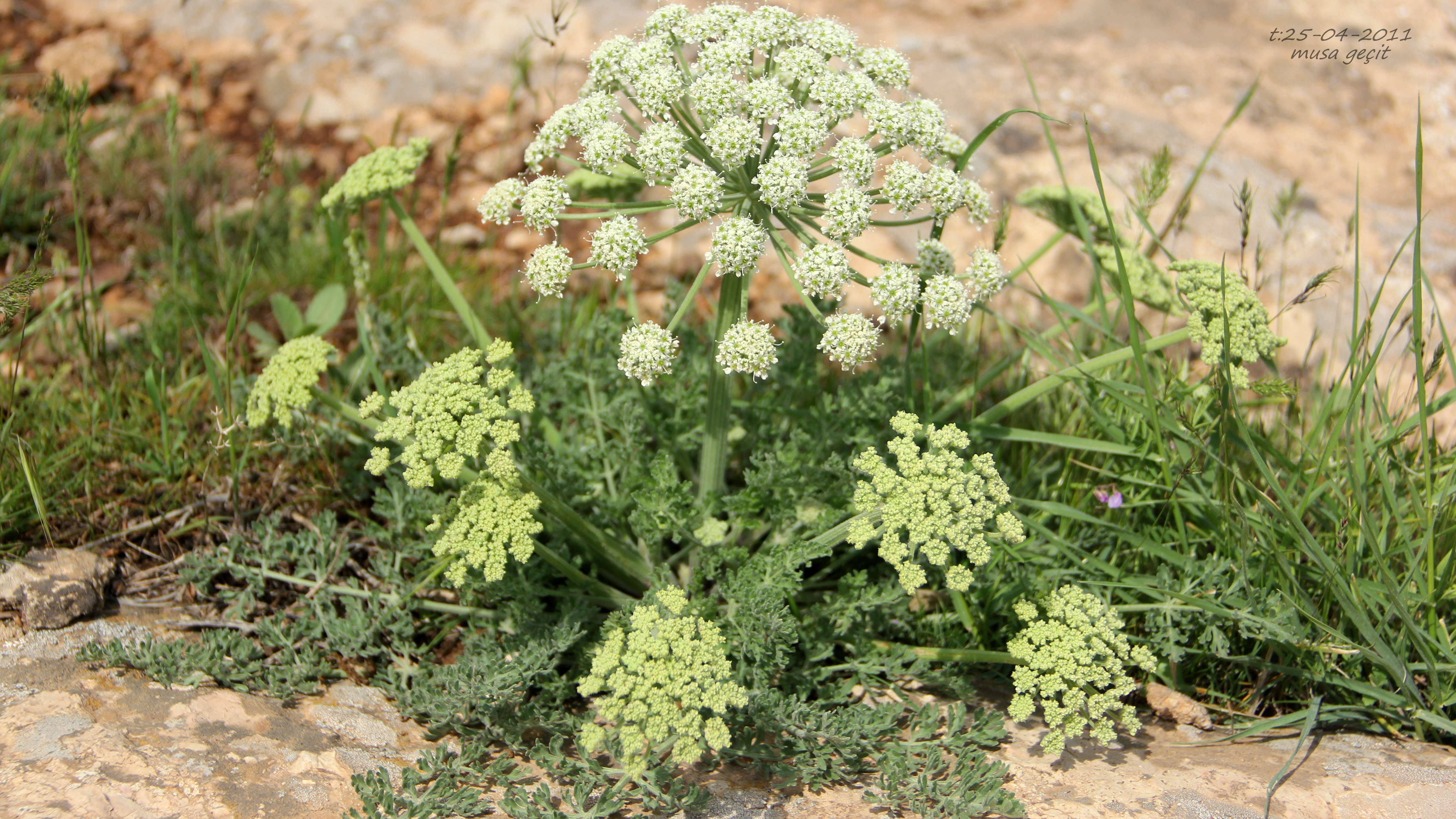 Yer:Mardin/ Zosima absinthifolia